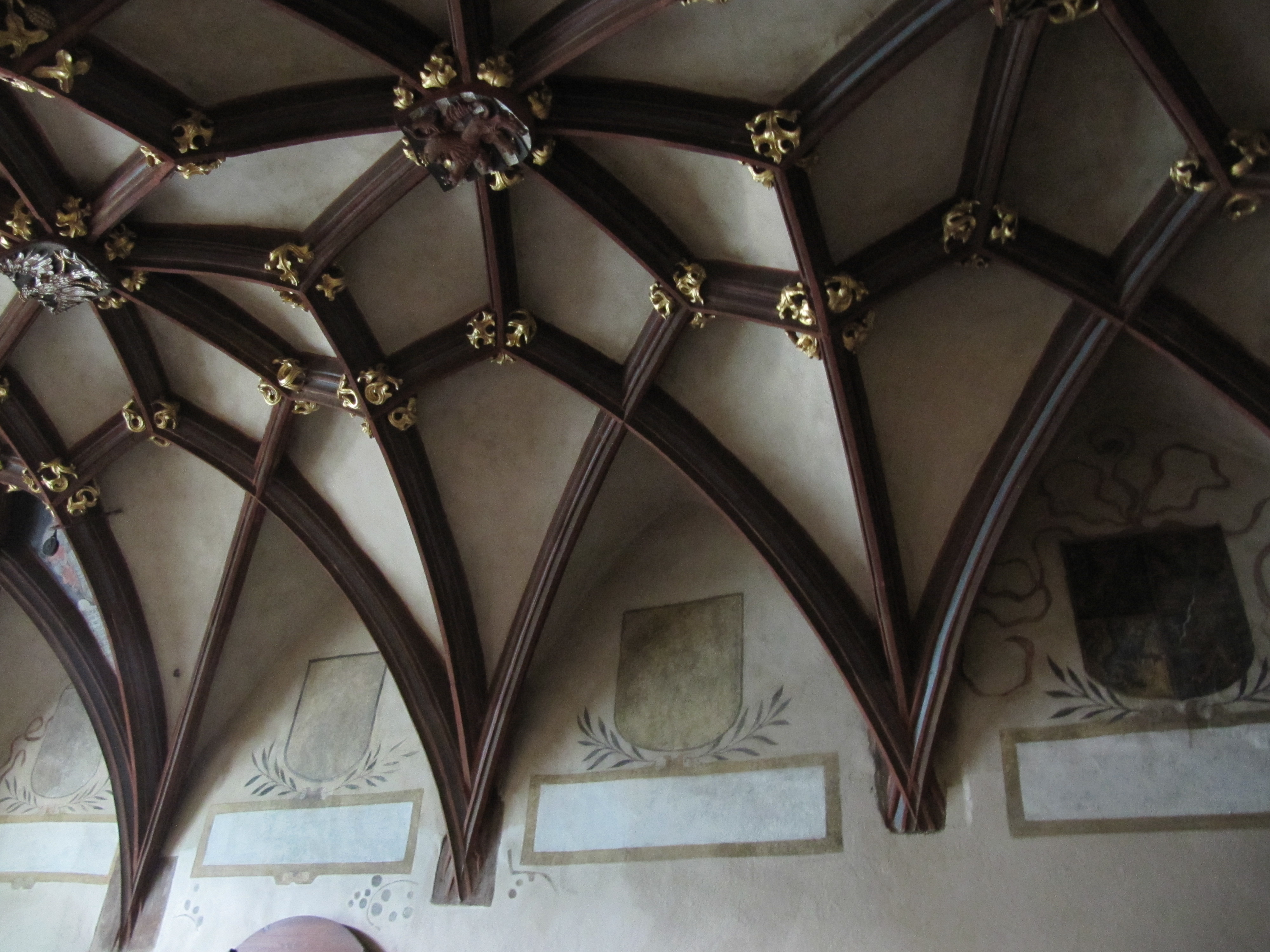 Pražský hrad, Praha 1-Hradčany, Starý královský palác, Vladislavova ložnice.